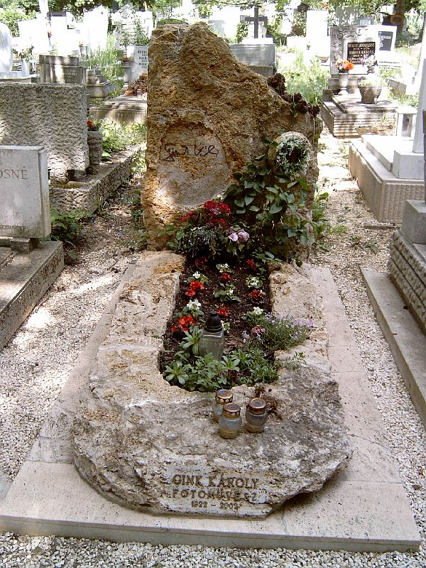 Gink Károly (Iván, 1922. február 4.–Budapest, 2002. május 10.) fotóművész sírja Budapesten. Farkasréti temető: 25-2-10.